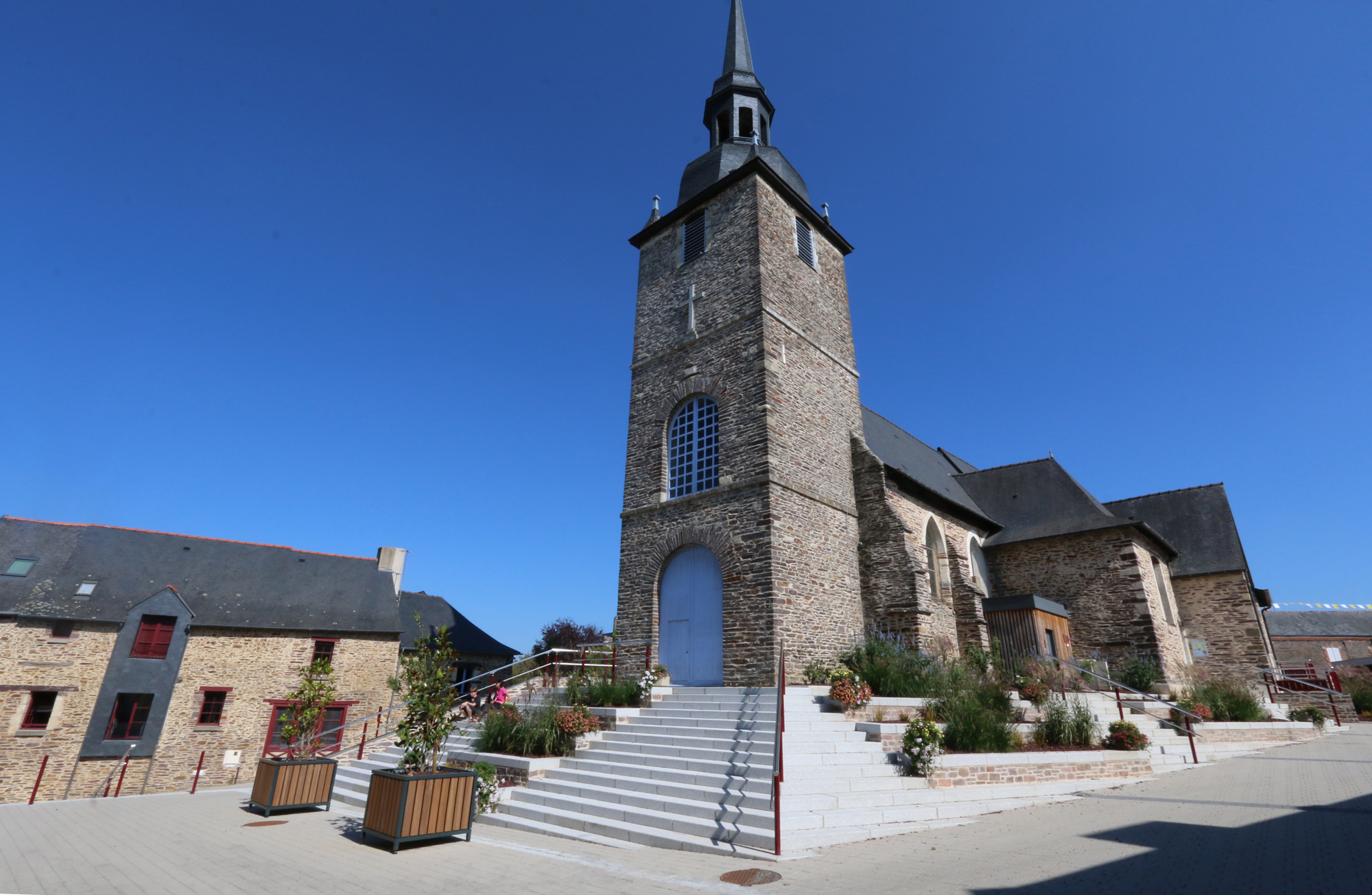 Église Saint-Martin d'Orgères